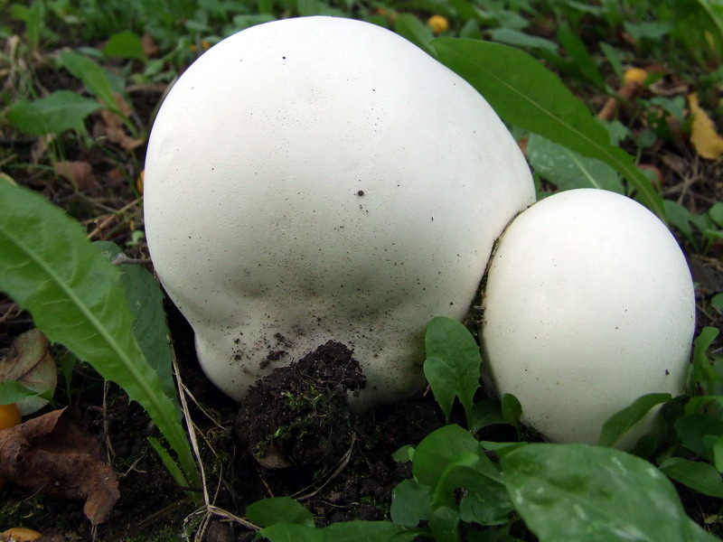 Langermannia gigantea. Dasiūnai, Kaunas district, Lithuania.